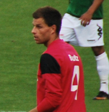 Fodboldspilleren Ole Budtz fra FC Roskilde. Her i 1. divisionskampen mod Viborg FF på Viborg Stadion.